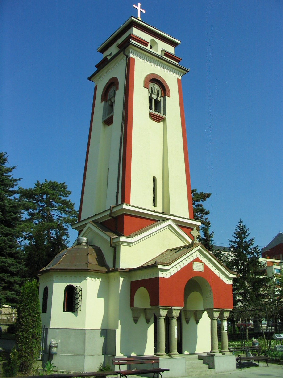 Звоник Саборне цркве Успења пресвете Богородице у Крагујевцу